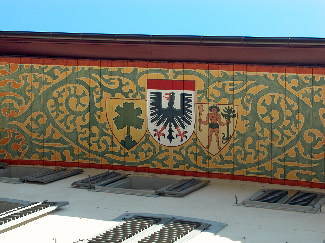 Typischer Aarauer Giebel Aufgenommen am 22.4.2005 von Alexander Umbricht